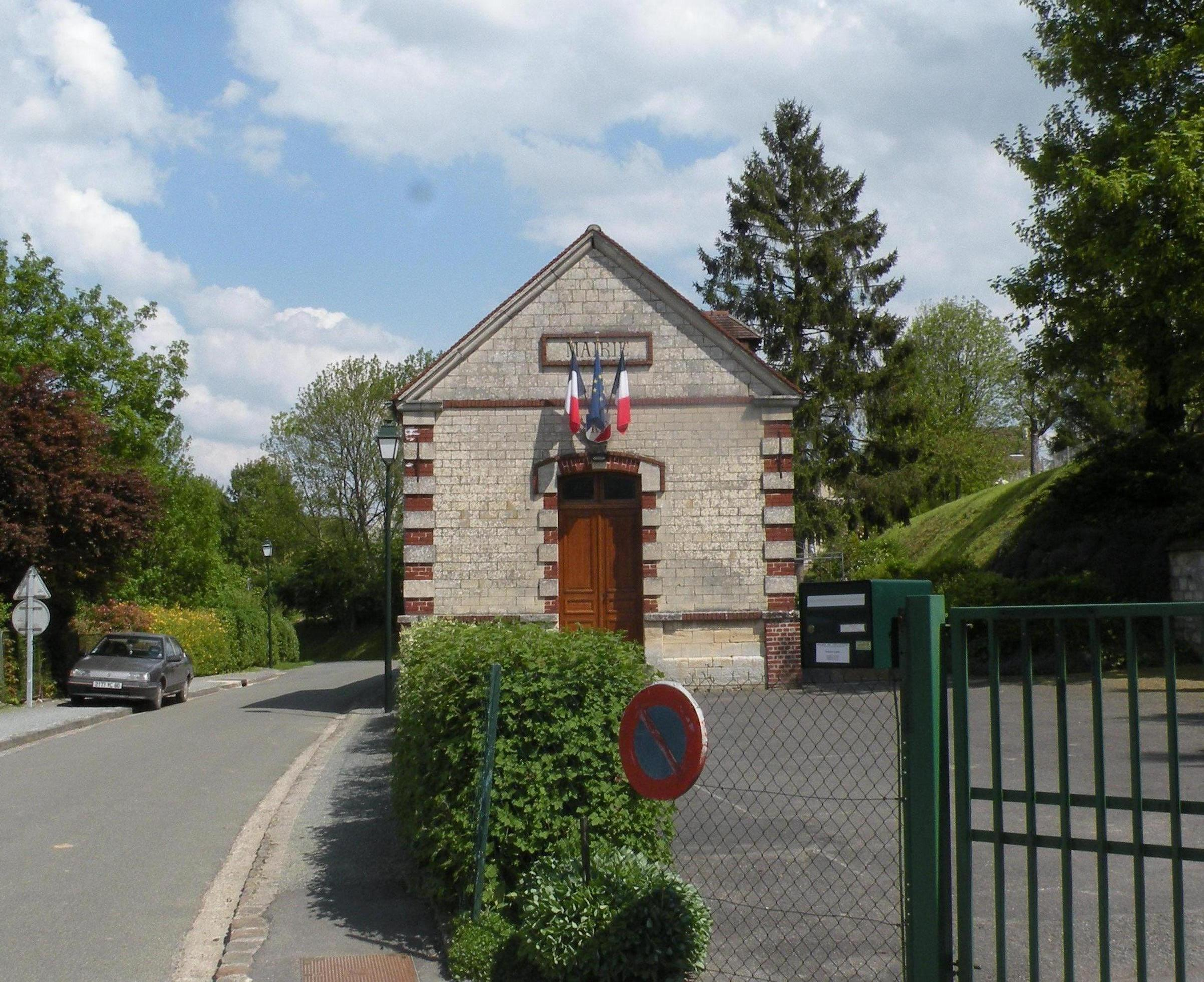 mairie de Foulangues